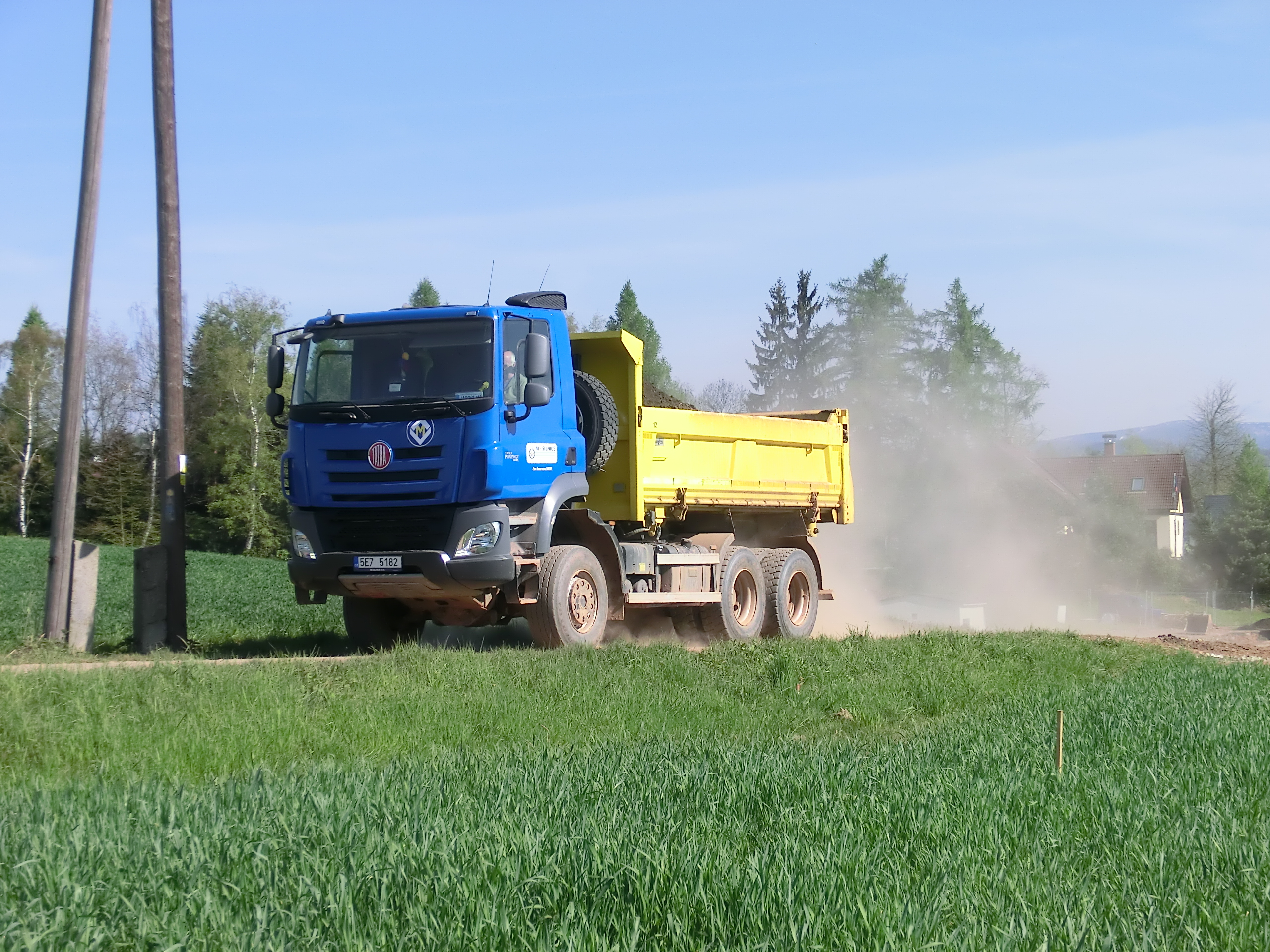 Tatra 158 Phoenix Euro 6, ve vlastnictví firmy M-Silnice, pracuje na stavbě Všesportovního areálu Hraběnka v Jilemnici.